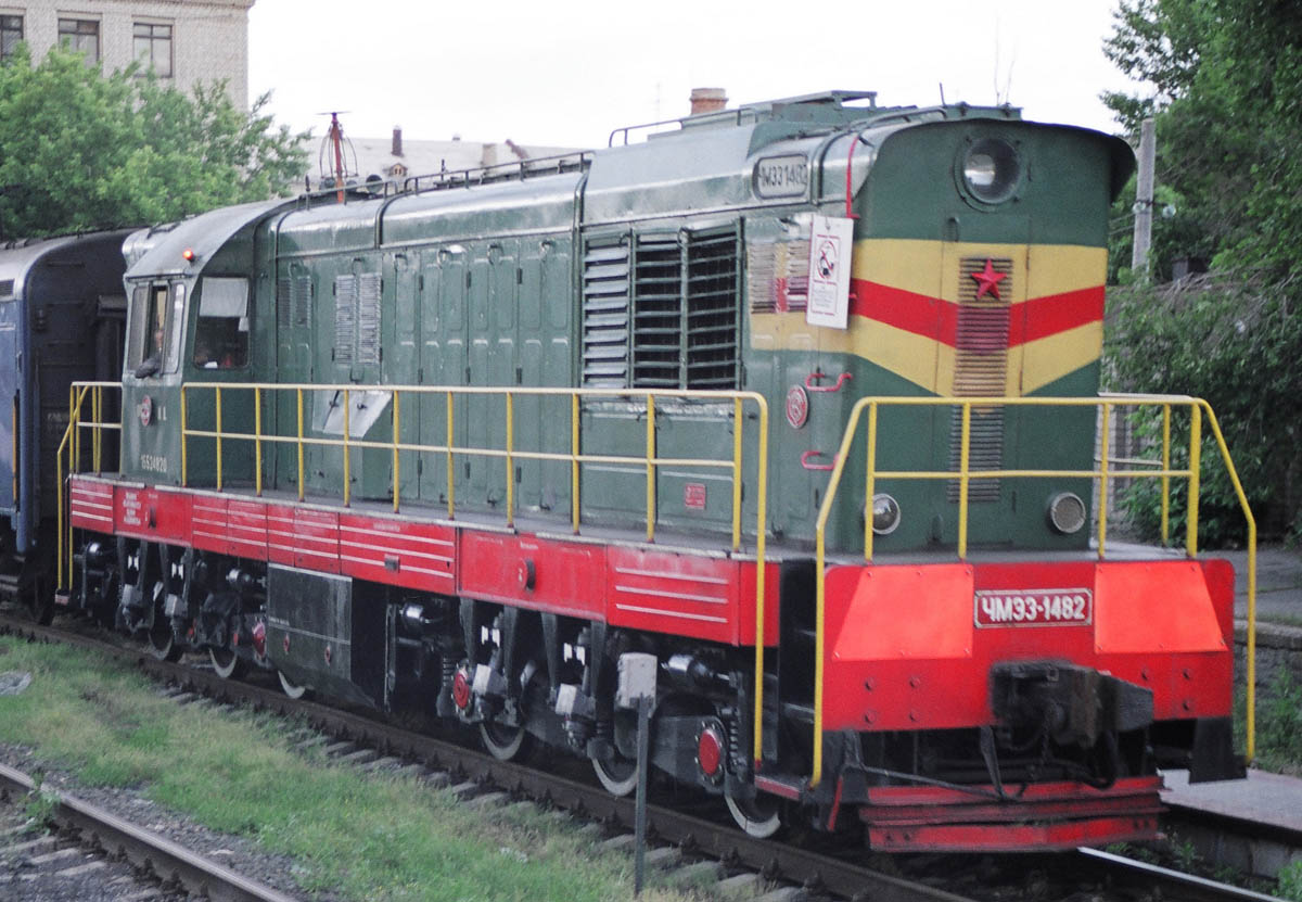 Тепловоз ЧМЭ3-1482 на станции Волгоград-1